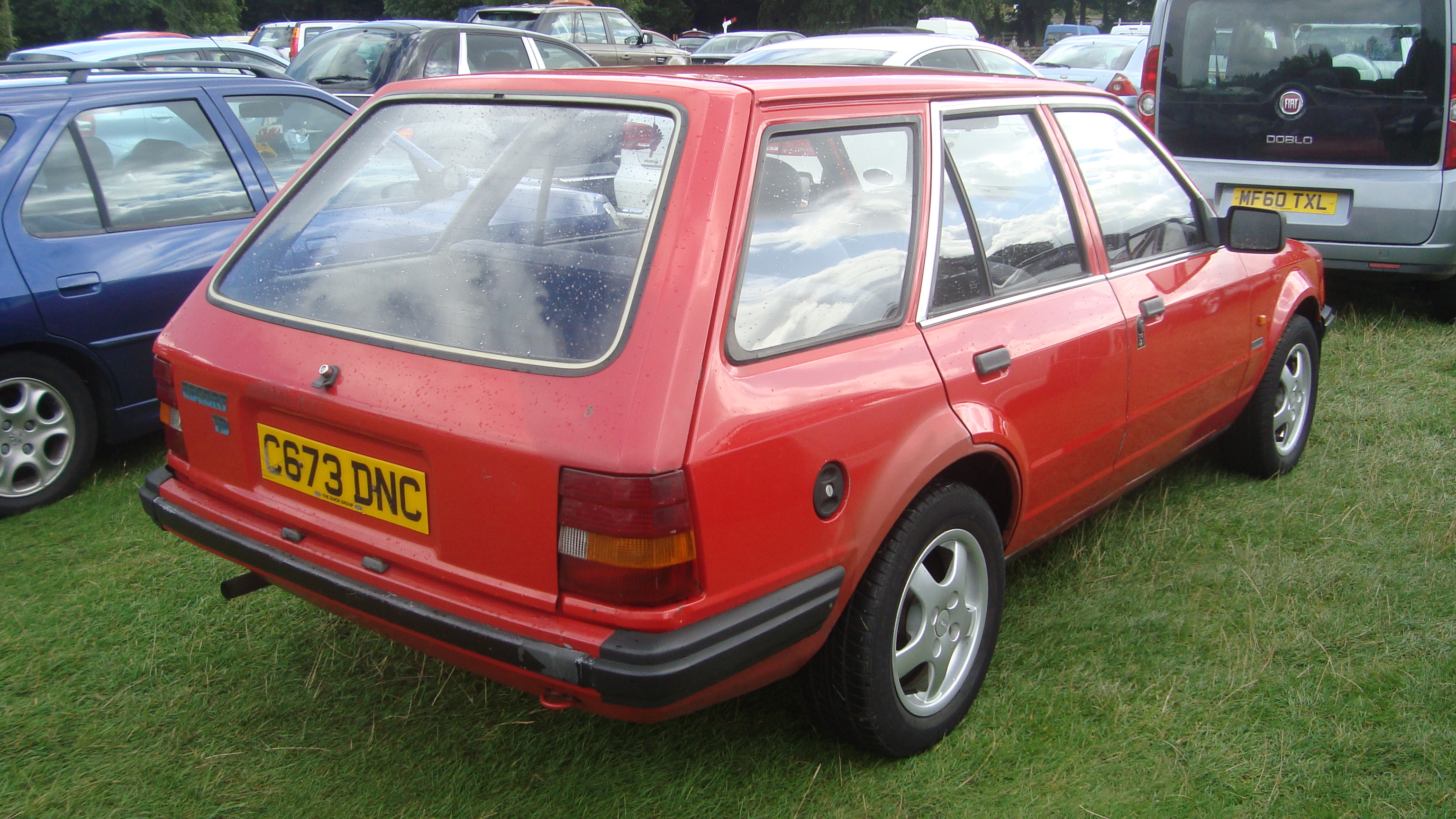 1986 Ford Escort 1.3 Laser II Estate